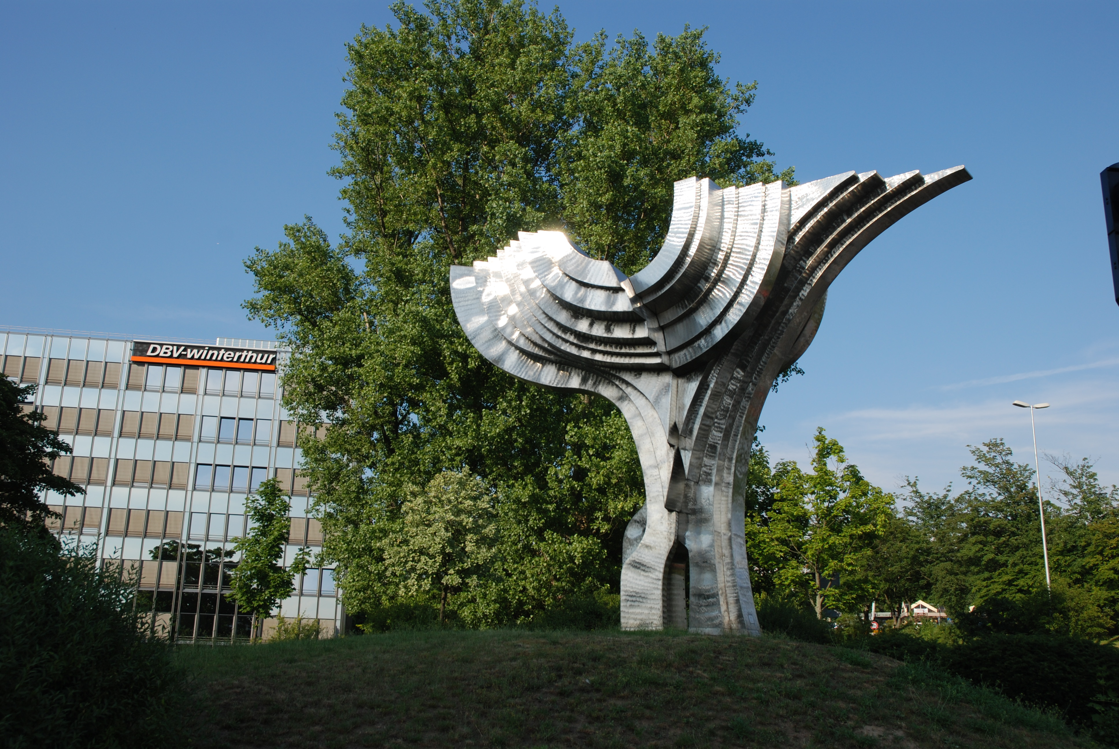 Bernd Rosenheim: Phoenix (1975). Edelstahl, 750 cm hoch. Dauerleihgabe der Bernd-Rosenheim-Stiftung. Neuerrichtet 2002 vor der DBV-Winterthur Wiesbaden (ehemals vor dem Hauptpostamt). Anfertigung Heinrich Hammerich KG, Offenbach am Main.